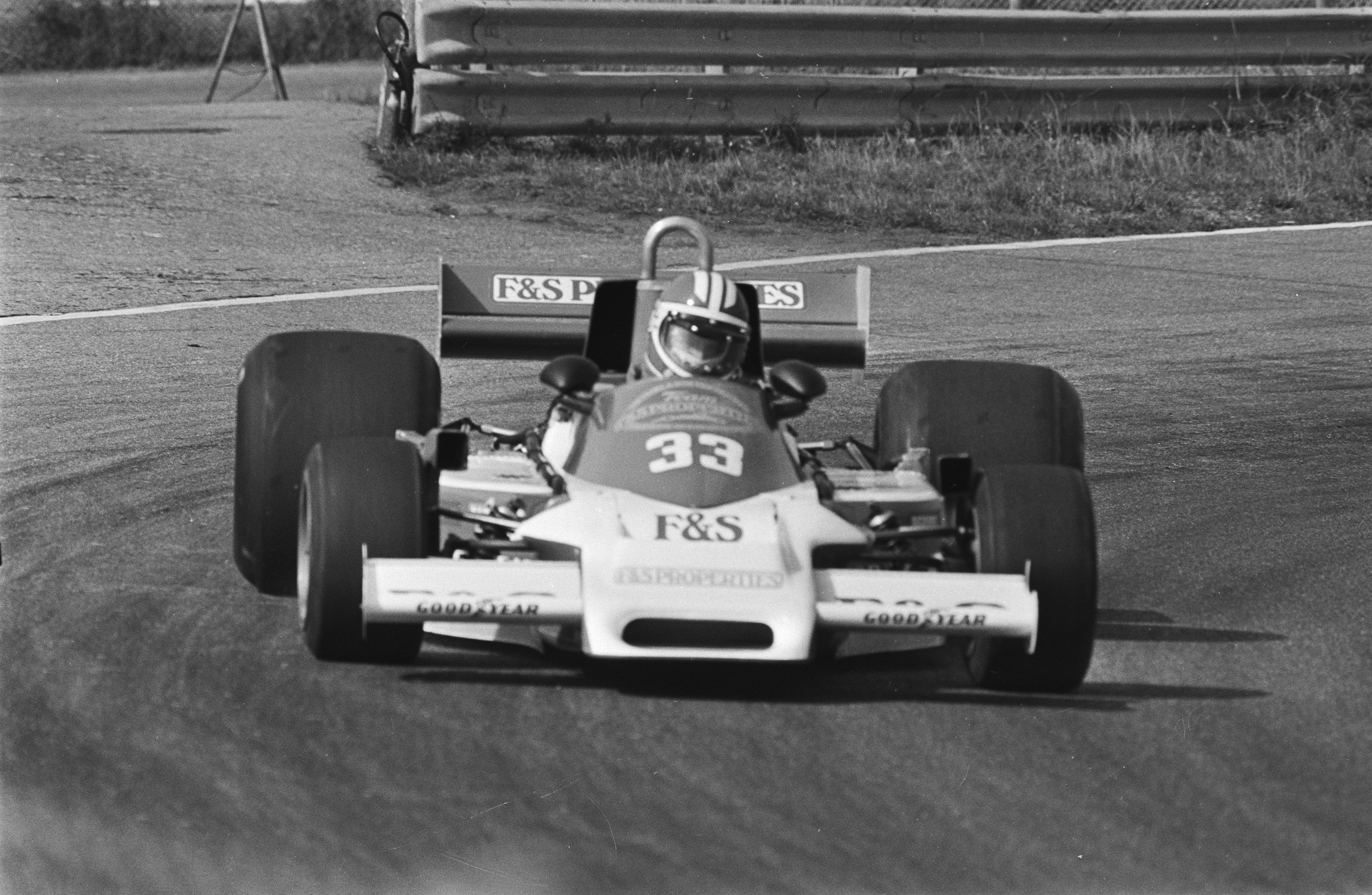 Kwalificatieritten voor training Grand Prix van Nederland Michel Bleekemolen in actie in een March.